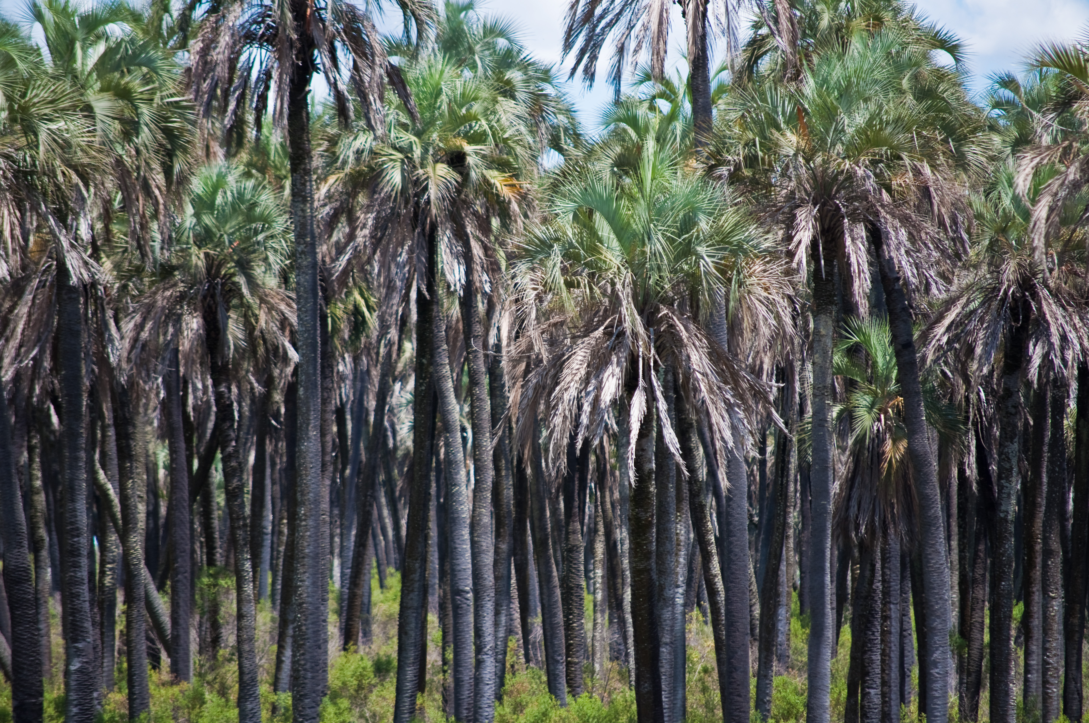 Yatay Palms, El Palmar, Entre Rios, Argentina, 1 Jan. 2011